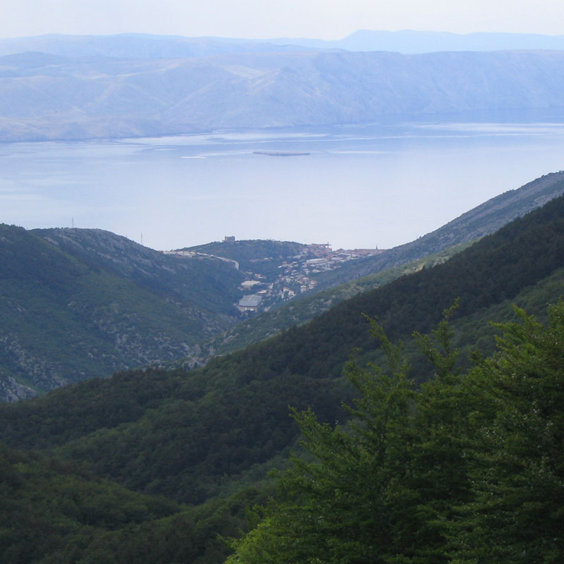 Senj, pogled s prijevoja Vratnik